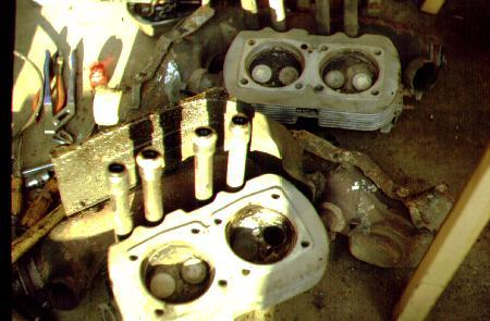 Motorschaden VW Kaefer 02